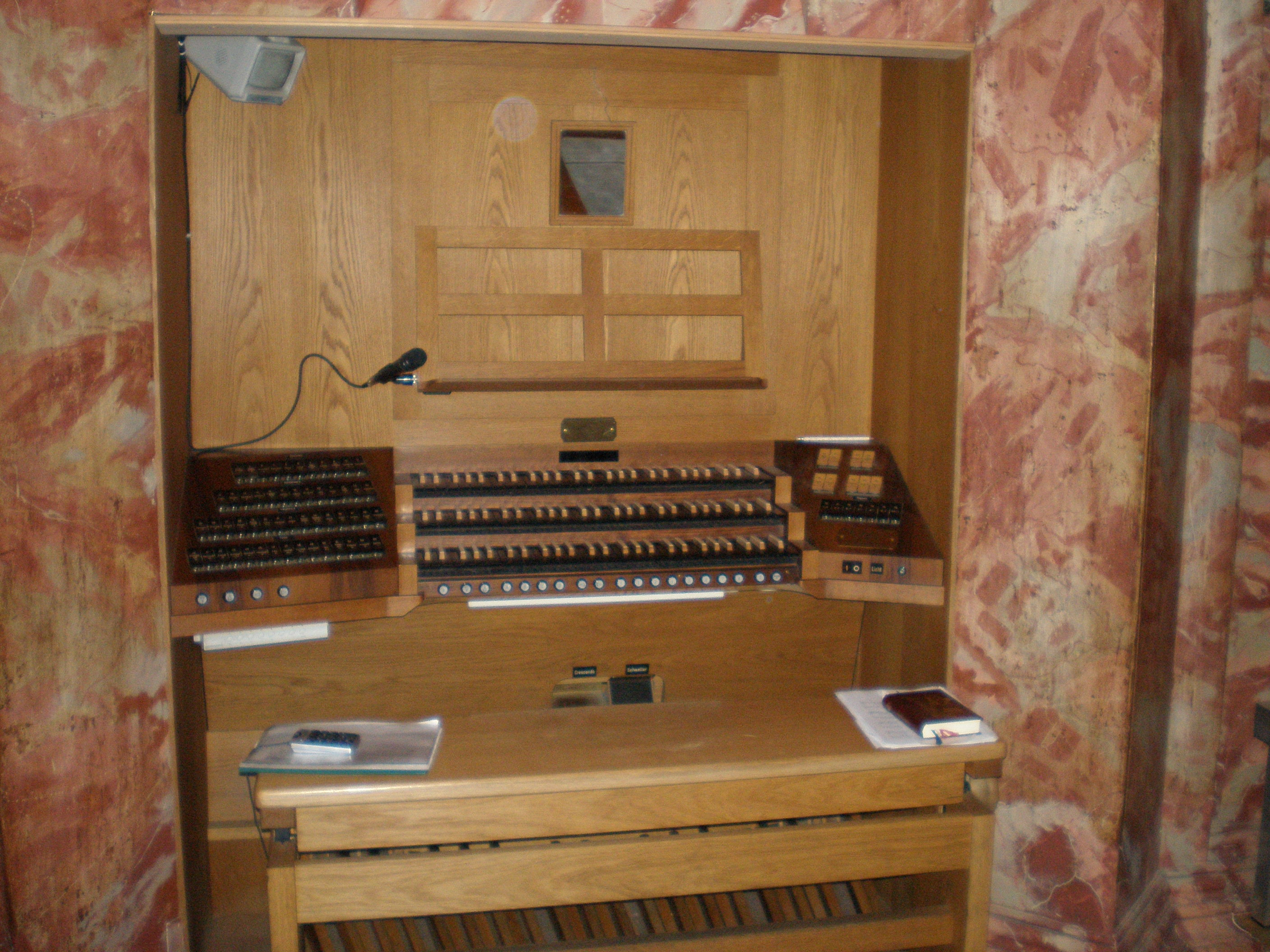 Sviraonik orgulja varaždinske katedrale